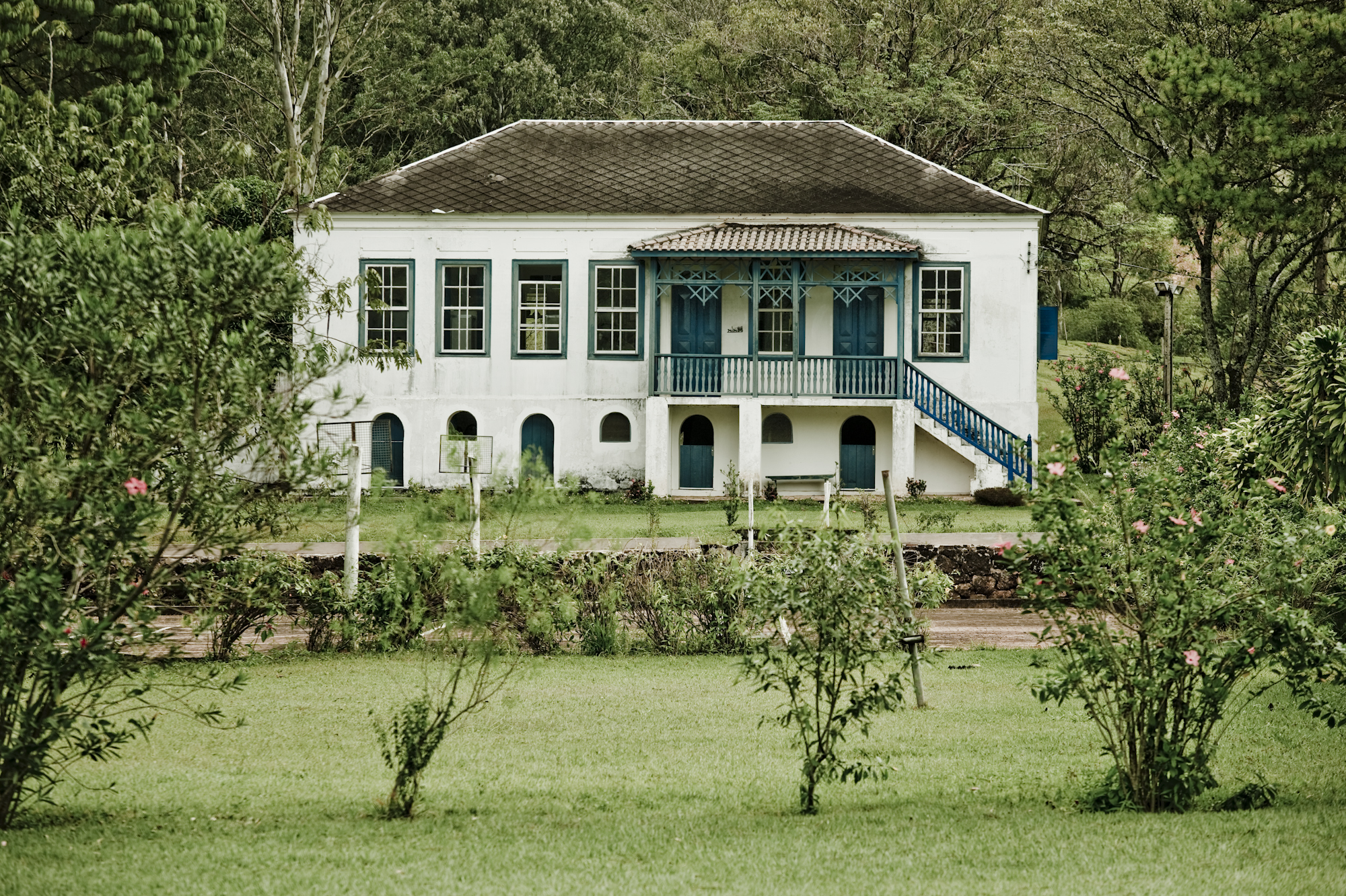 fazenda em agudos